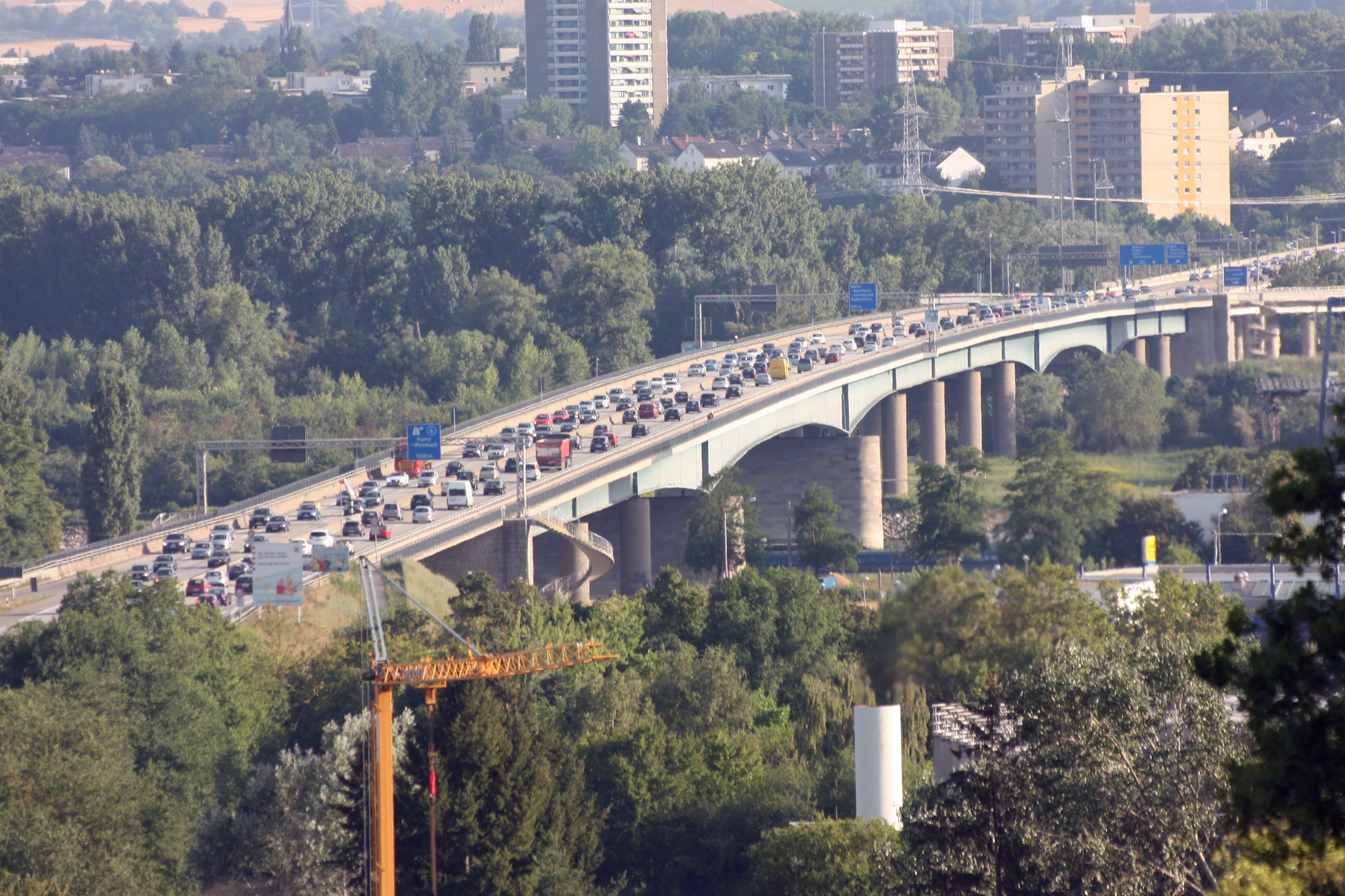 Schiersteiner Brücke bei Wiesbaden